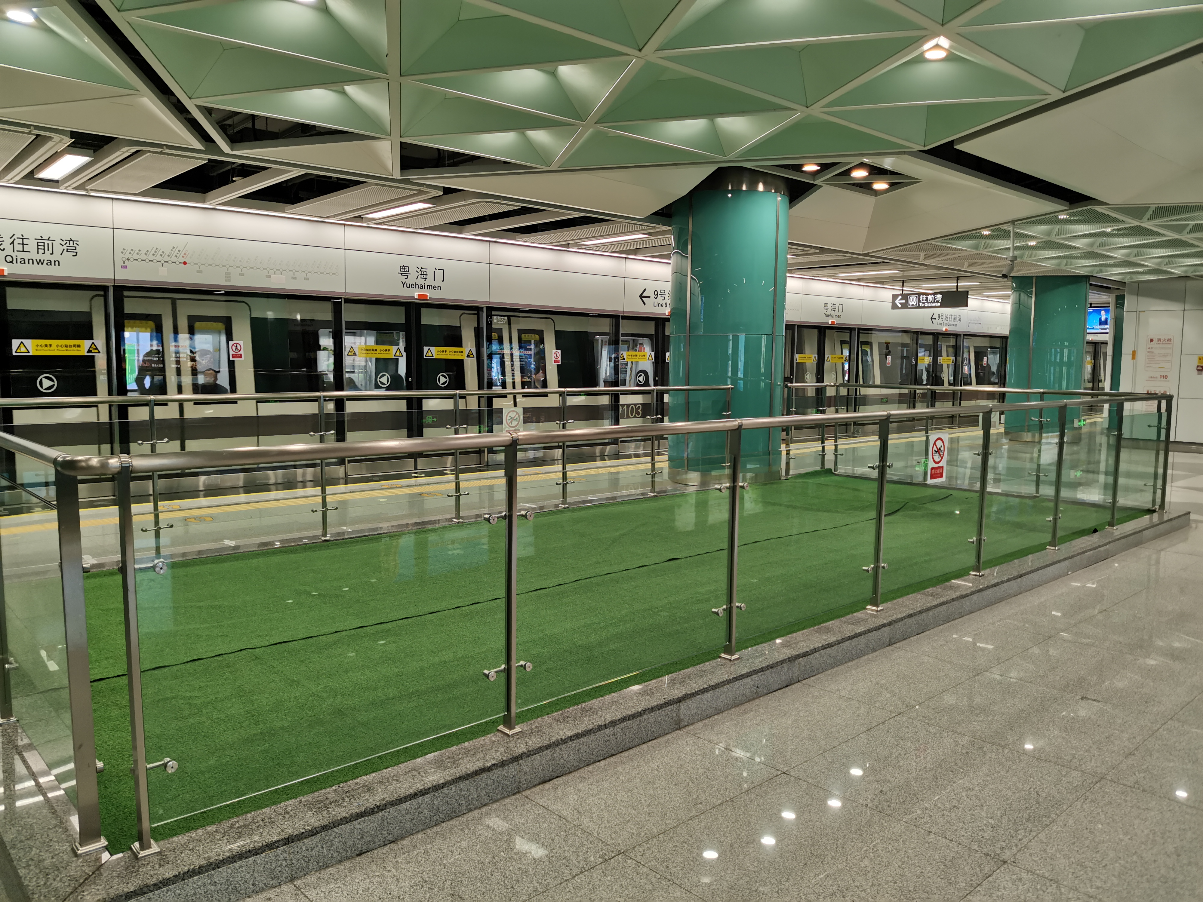 粤海门站月台，有13号线上下换乘的预留口